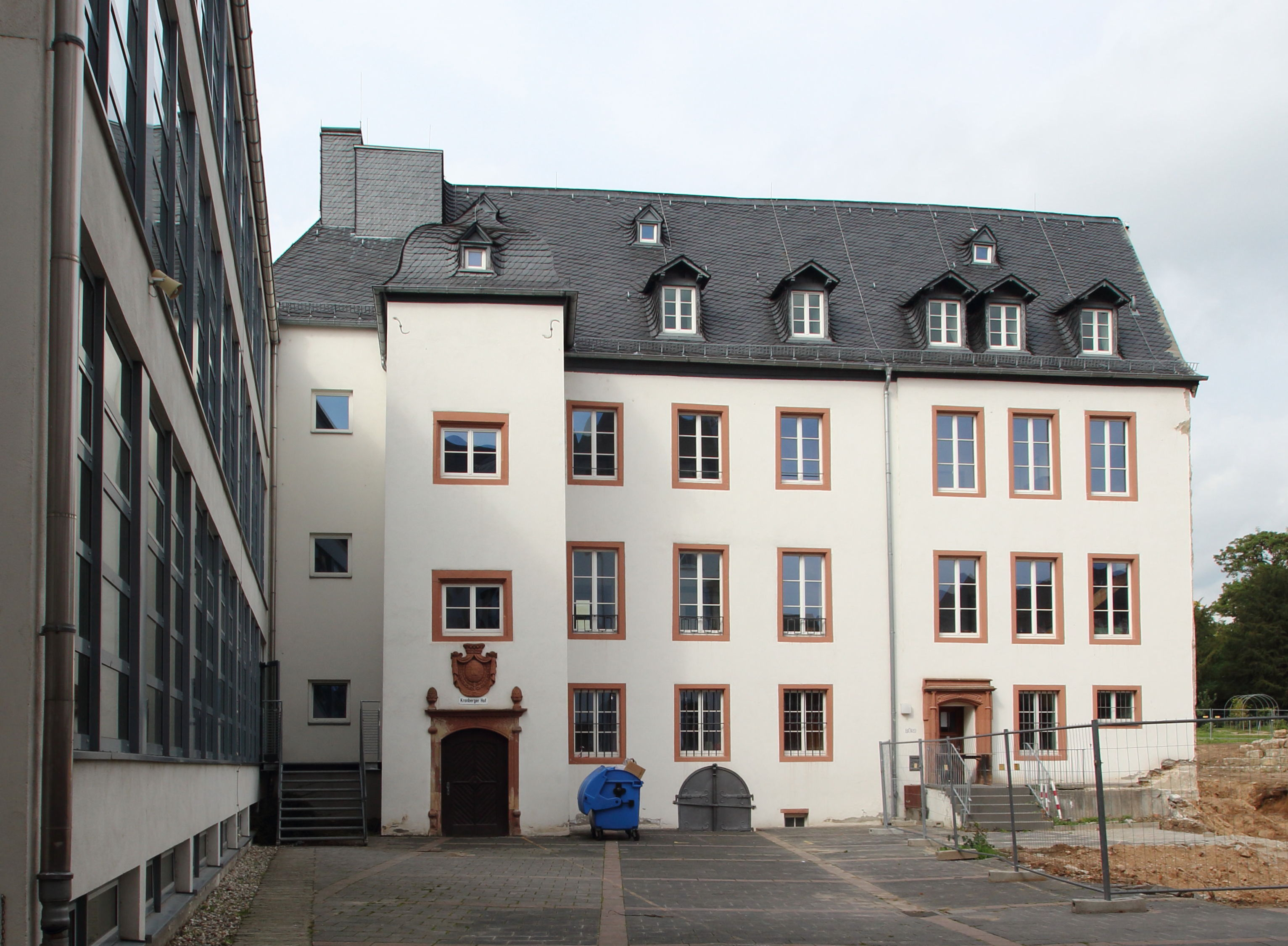 Kronberger Hof. Erbaut 1581. Seit 1894 Teil der St. Ursula-Schule. Rüdesheimer Straße 30, Geisenheim im Rheingau.